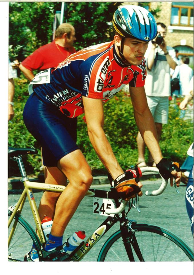 Deze foto is genomen door mij van mijn zoon tijdens de Ronde van Namen 2000.